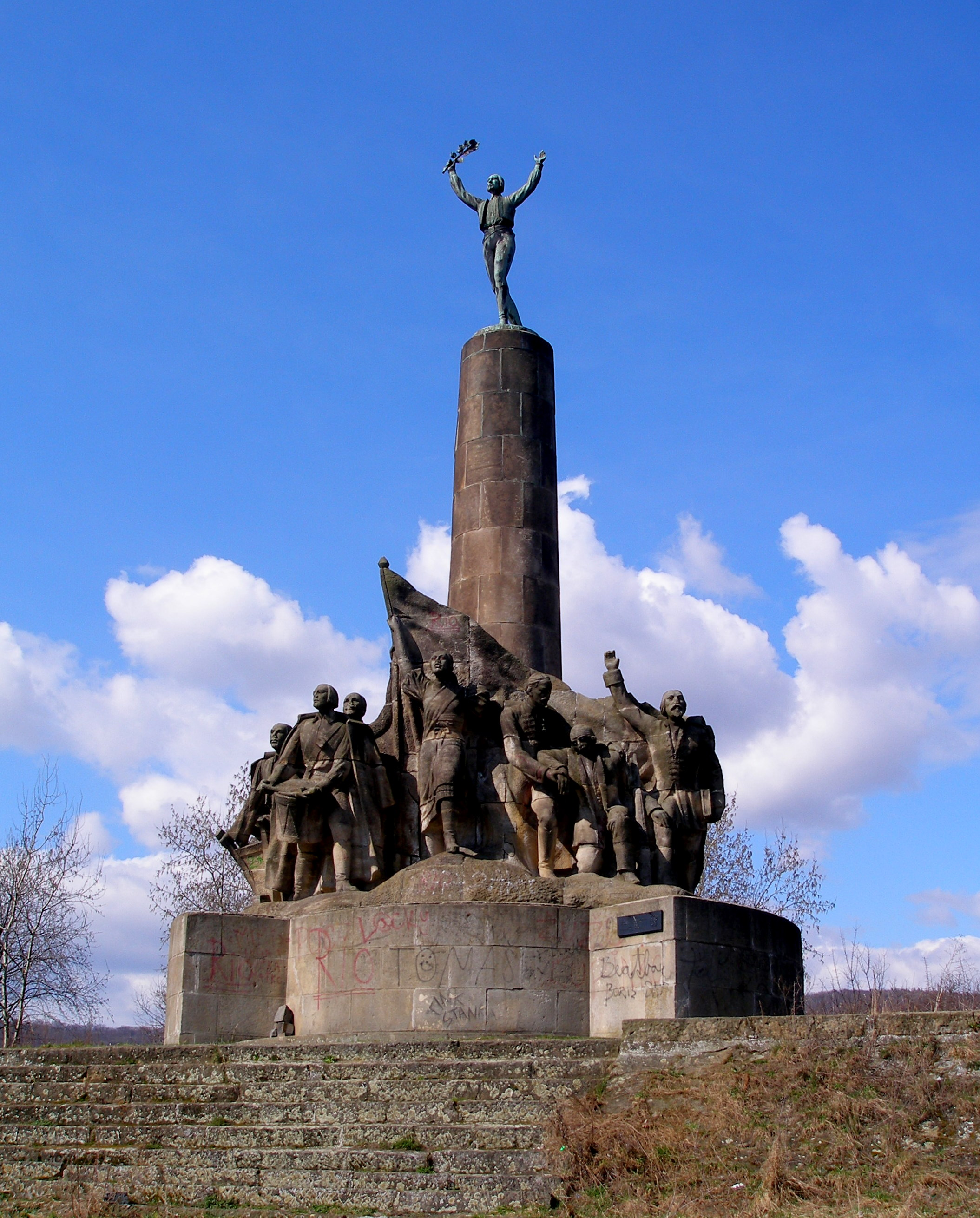 Kopec Furča nad obcou Haniska pri Prešove. Pomník sedliackeho povstania.Hlavným motívom pamätníka je bronzová socha víťazne kráčajúceho muža, umiestnená na vysokom valcovom pylóne. V podnoží je súsošie 7 povstalcov, ktorí symbolicky znázorňujú všetky skupiny účastníkov povstania.Celková výška pamätníka je 20 m. Postavy v súsoší sú až 3,2 m vysoké. Bronzová socha na pylóne je vysoká 4,2 m. V pravej ruke drží ratolesť dĺžky 0,4 m. Sochy v súsoší sú vytesané z pieskovca.